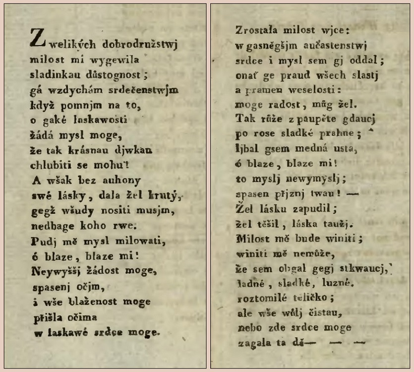 Milostná píseň krále Václava: obrázek podle knihy V. Hanka, Starobylá skládání, 1823